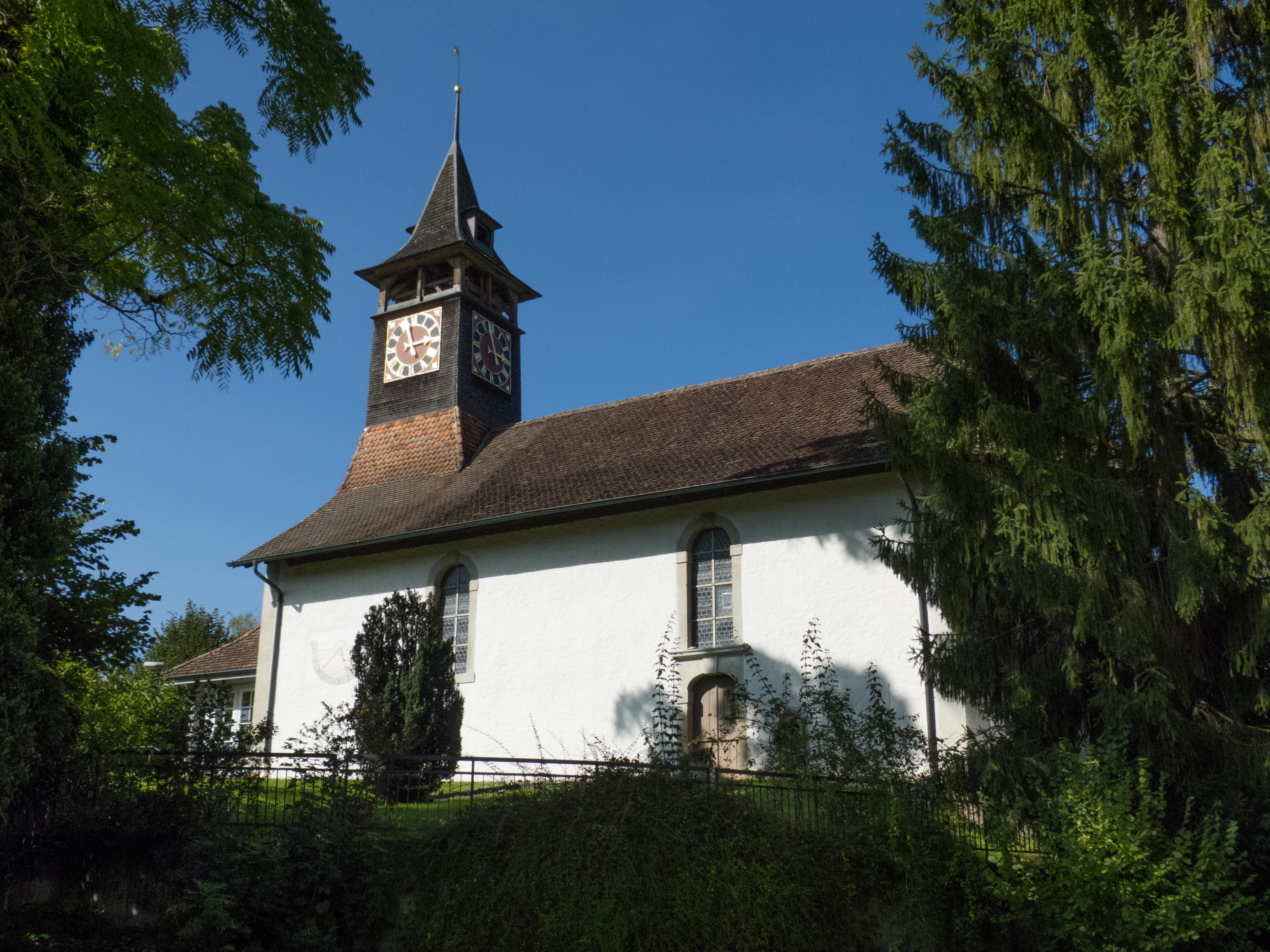 Reformierte Kirche mit Pfarrhaus und Pfrundscheune